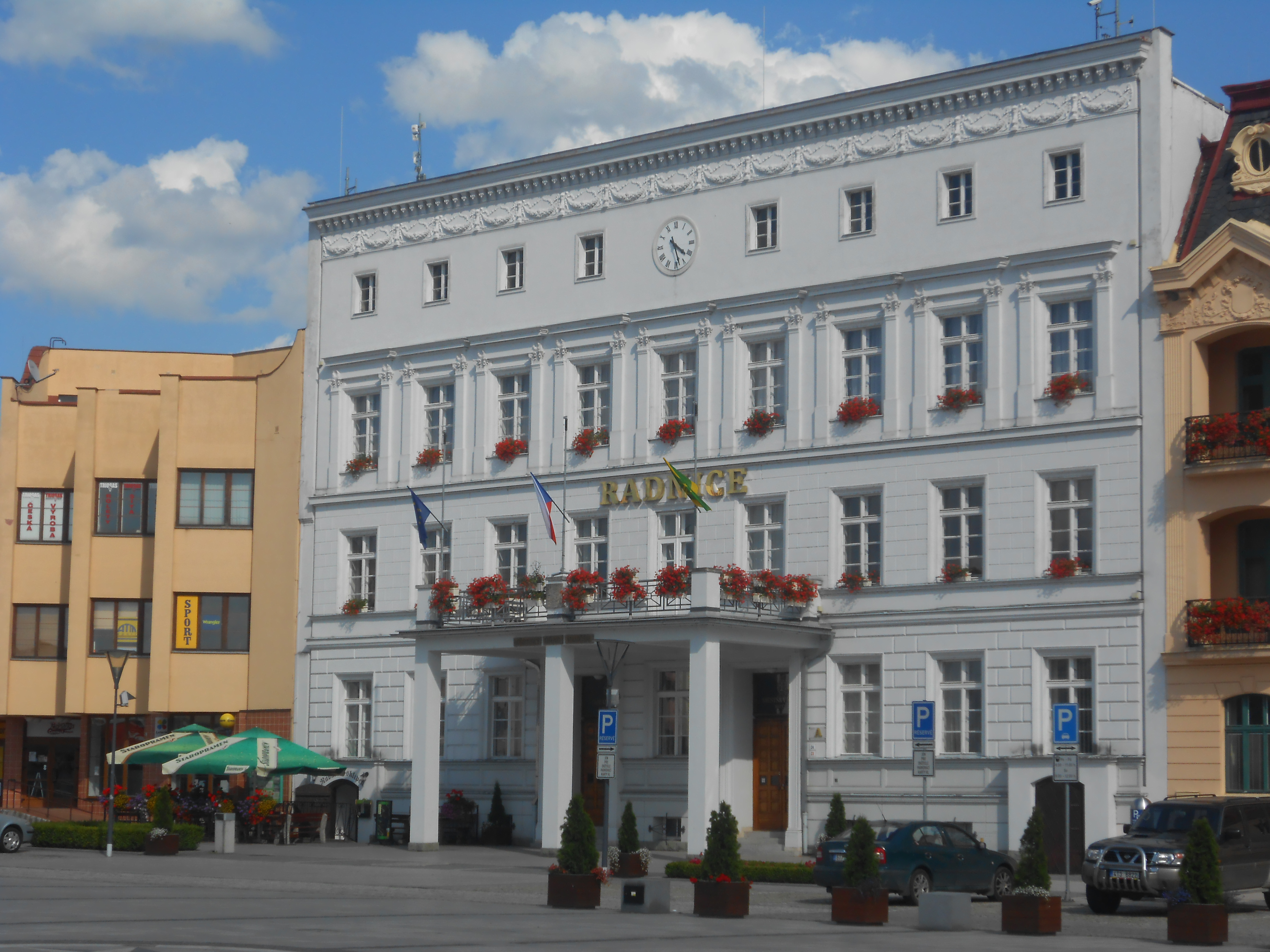 Hlučín, Mírové nám. budova radnice